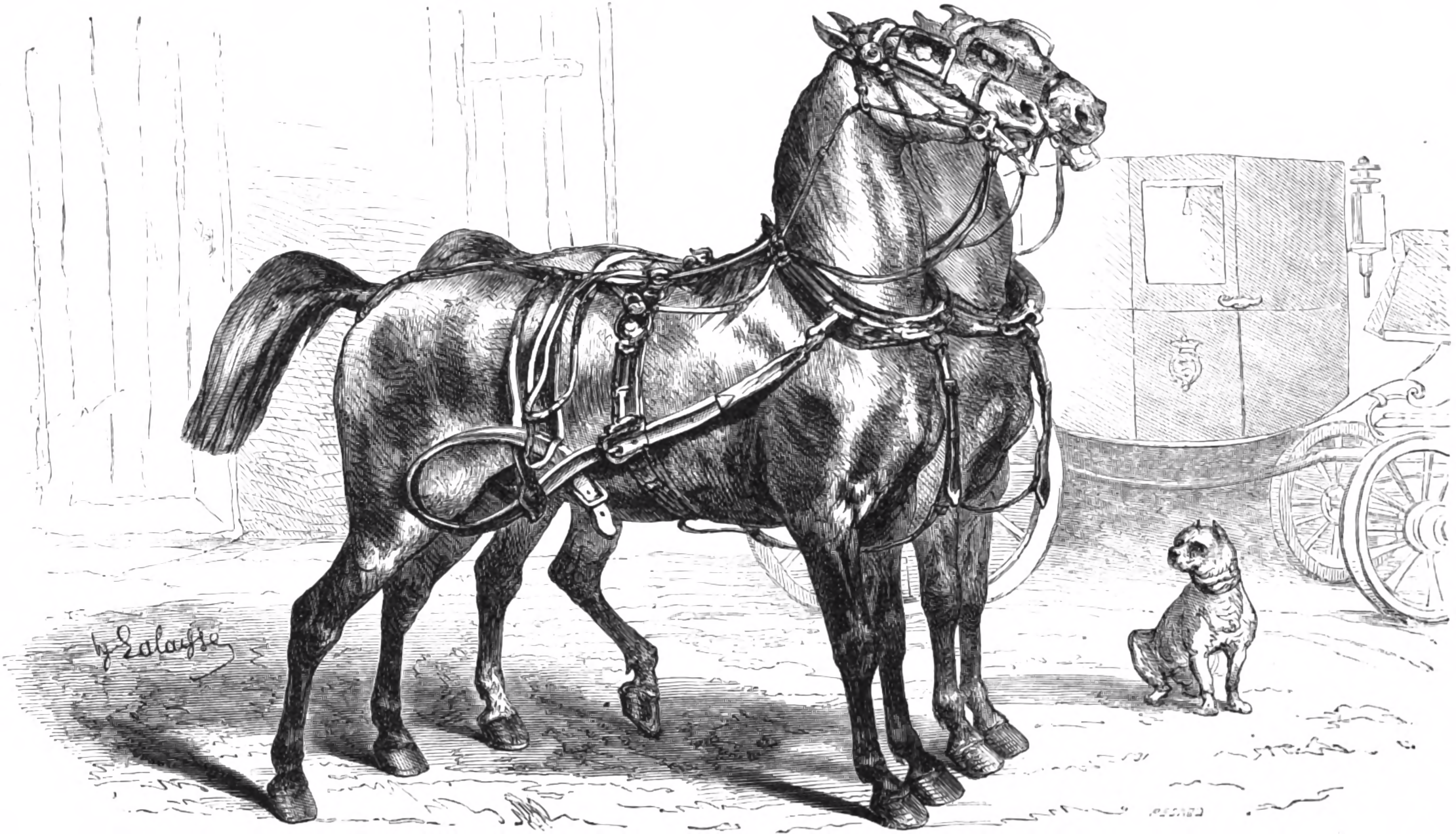 Planche XXXIII, chevaux landais